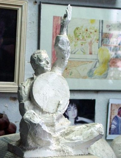 Ахмет Бацкоевич Цаликов посвятил эту скульптуру Мугаму, классическому музыкально-поэтическому искусству азербайджанской традиционной музыки. Работа хранится в мастерской художника и изображение предоставлено автором